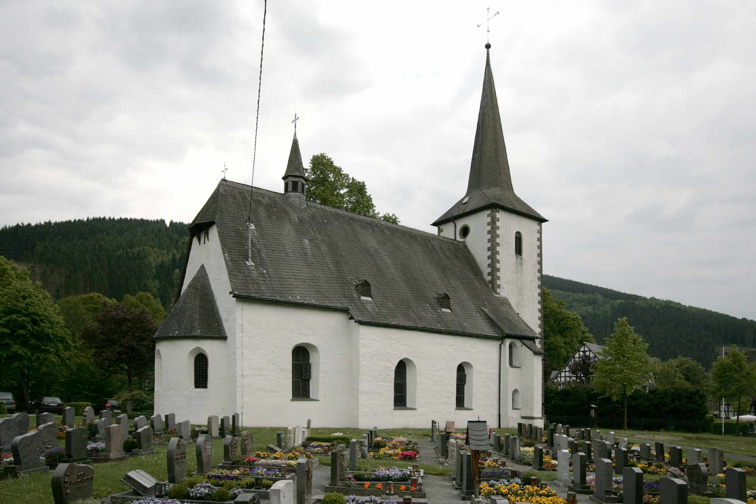 Kirche in Schmallenberg Lenne Ansicht von NO eigenes Foto--Wolfgang Poguntke 18:58, 23 May 2008 (UTC) Aufnahmedatum: 22.05.2008